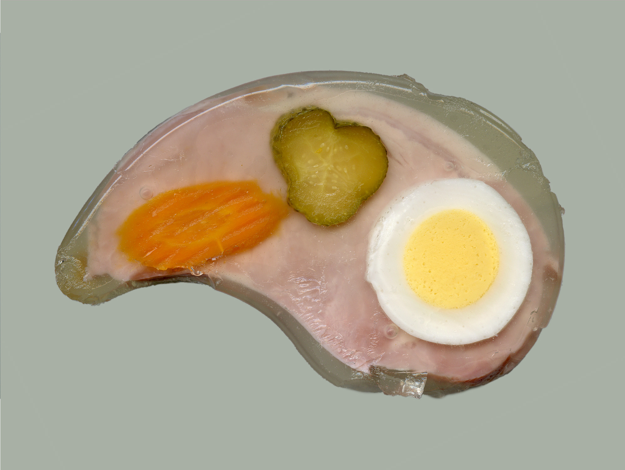 Sülzkotelett. Eigene Aufnahme, GNU FDL. Mit Gruß an Henriette